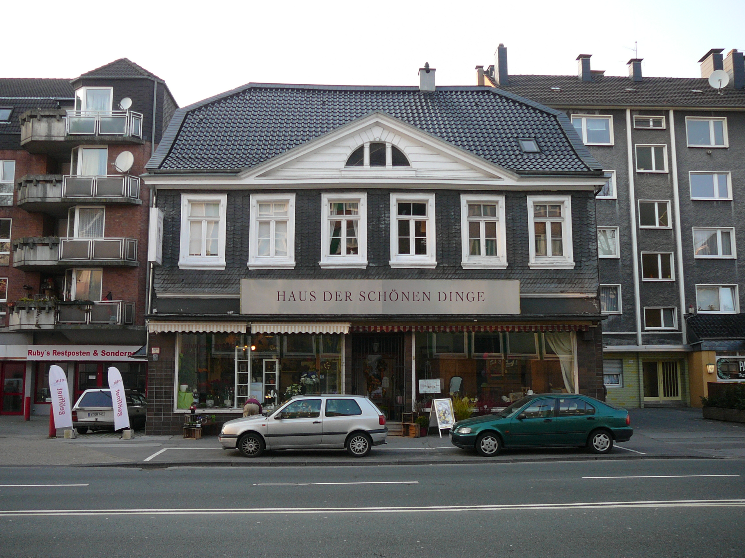 Friedrich-Engels-Allee, Wuppertal